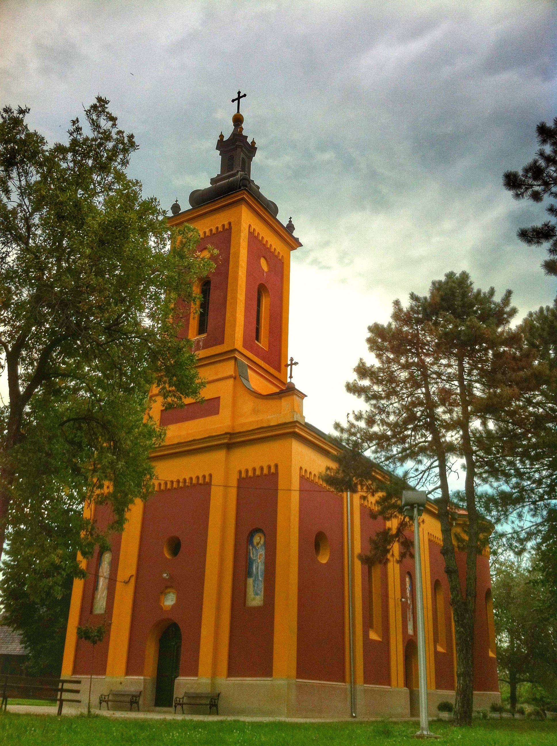 Црква је грађена у периоду 1890-1894 године.